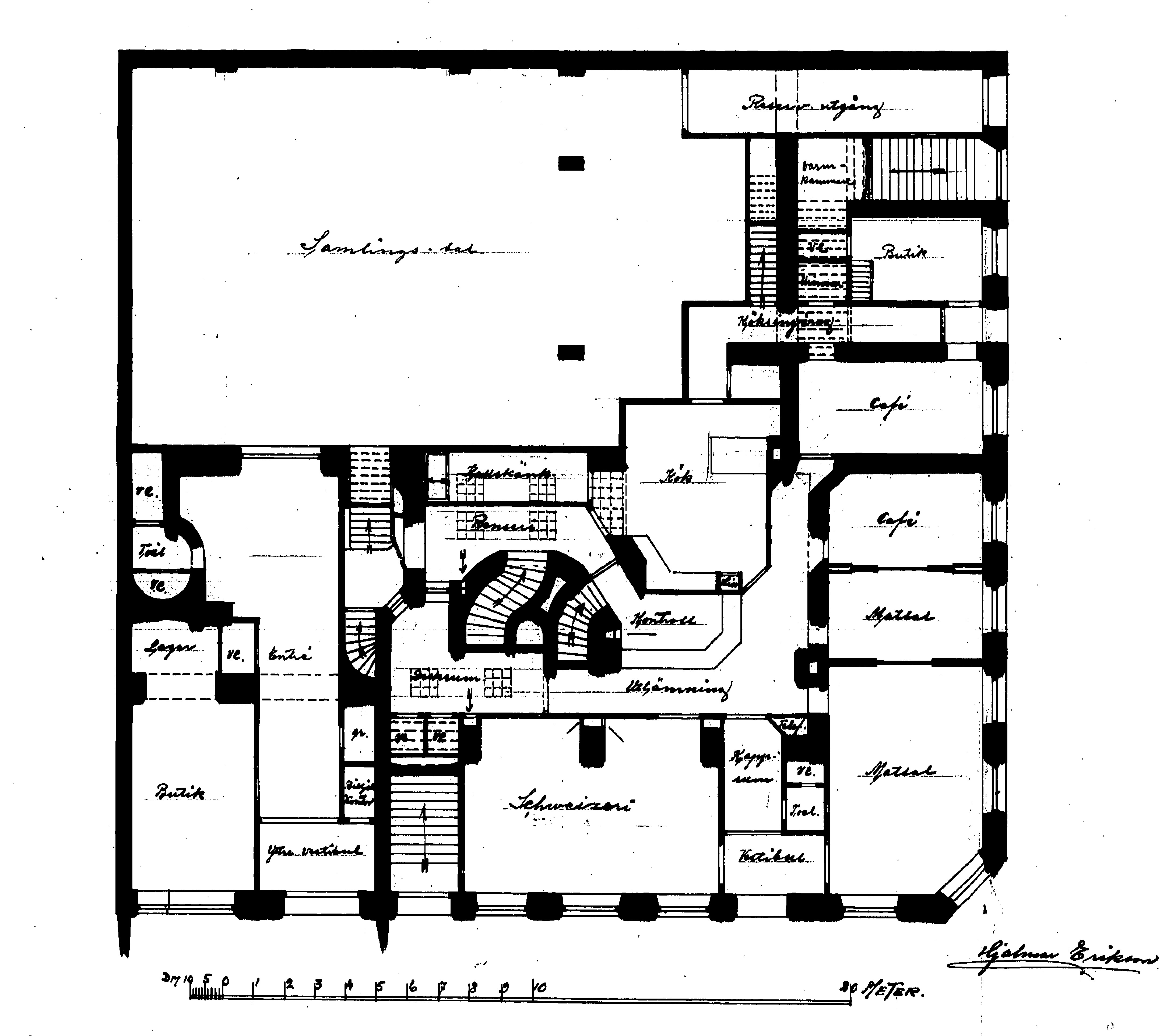 Bottenvåning för Götgatan 72 inrymde Bio-Kino och Källaren Druvan (huset är rivet)